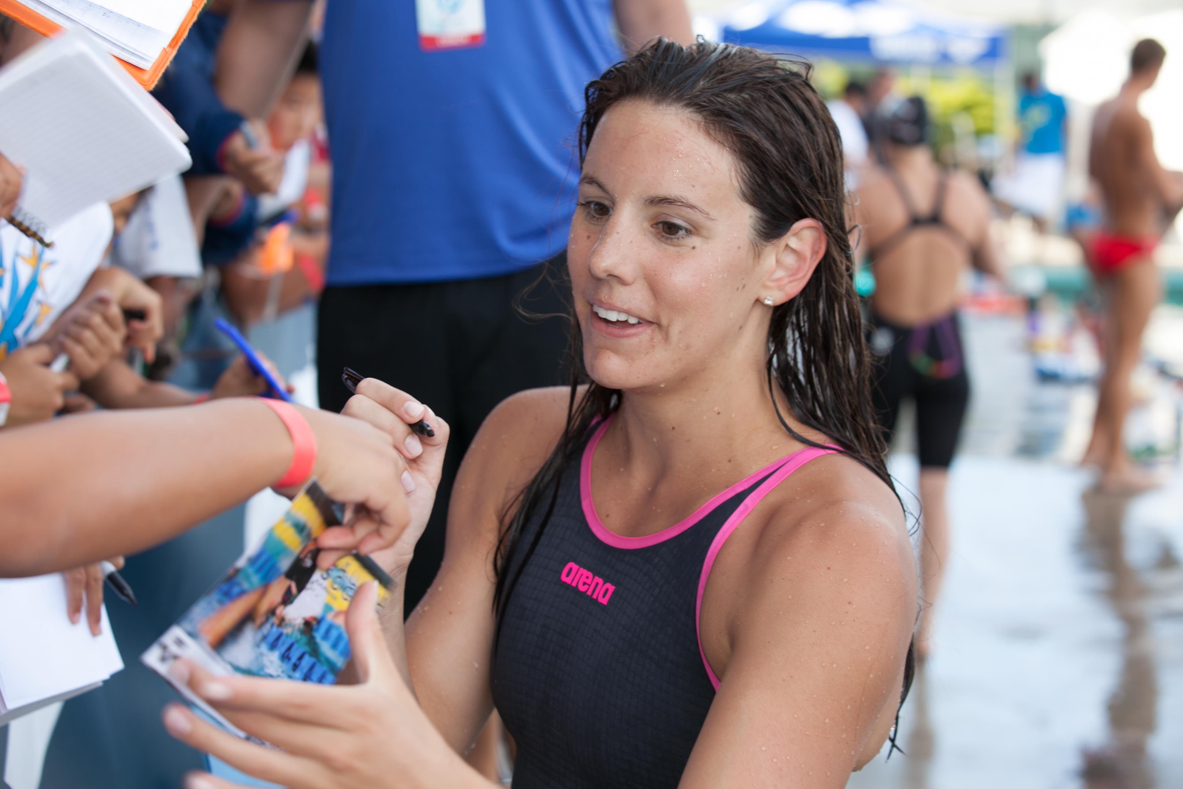 Laura Sogar signs autographs after 200m fly-2